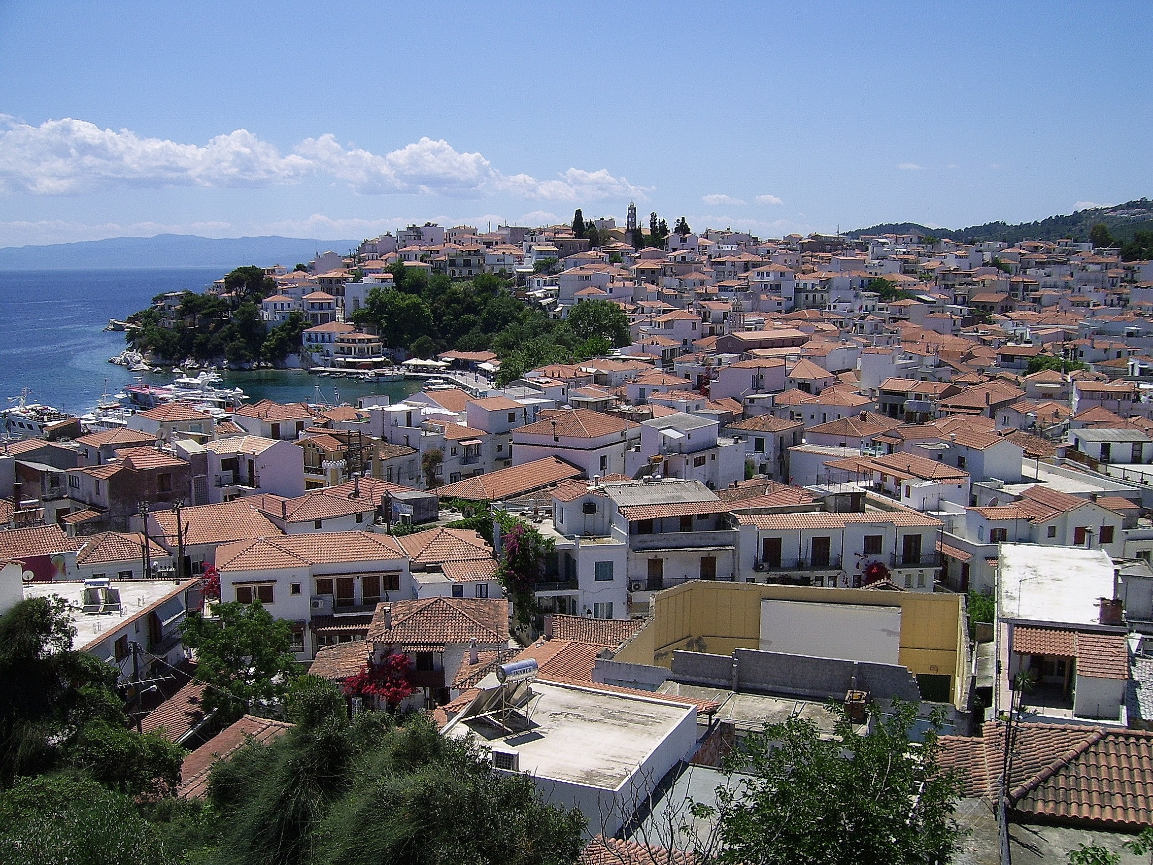 Skiathos view